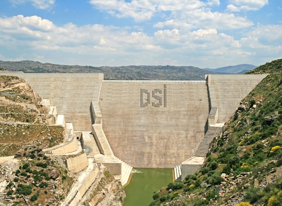 Adnan Menderes Barajı